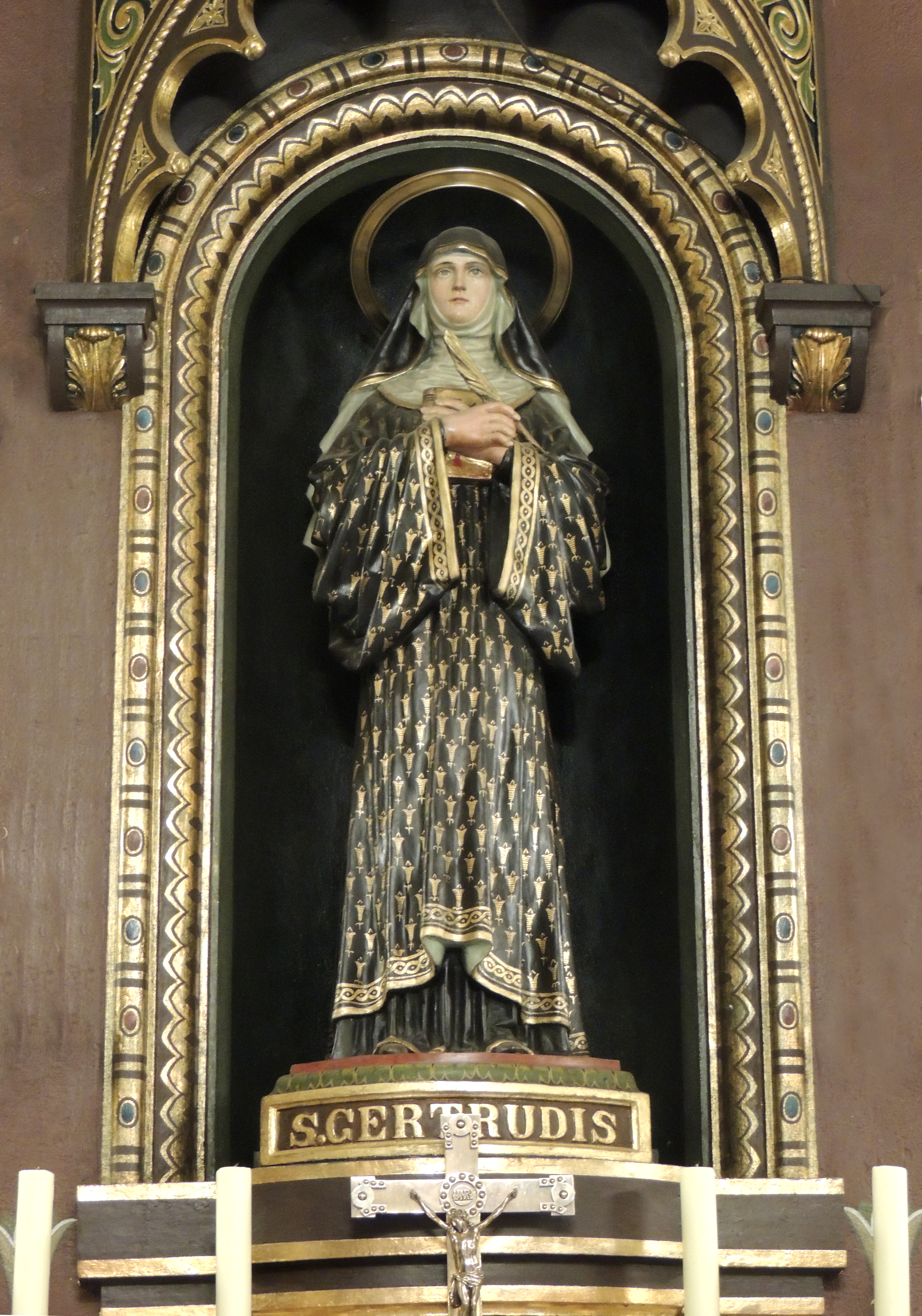 Integra um conjunto de estátuas da Basílica de Nossa Senhora da Assunção do Mosteiro de São Bento na cidade de São Paulo.Os apóstolos têm cerca de 2,80 m de altura, são feitos de gesso policromo e estão instalados na nave da igreja beneditina, a uma altura de aproximadamente 3,5 m. Moldadas por Van Emelen em seu ateliê no Palácio das Indústrias, São Paulo, entre 1920 e 1922, as estátuas teriam sido inauguradas no dia da consagração da basílica, em 1922.